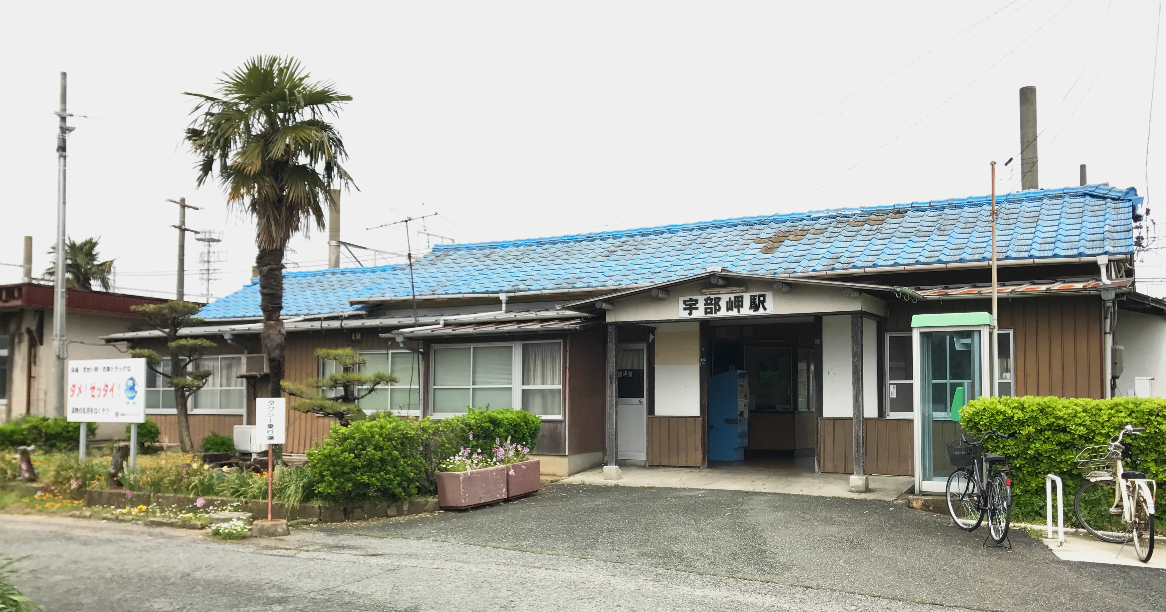 宇部岬駅駅舎